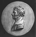 Buste officiel de Louis-Furcy Grognier le vétérinaire